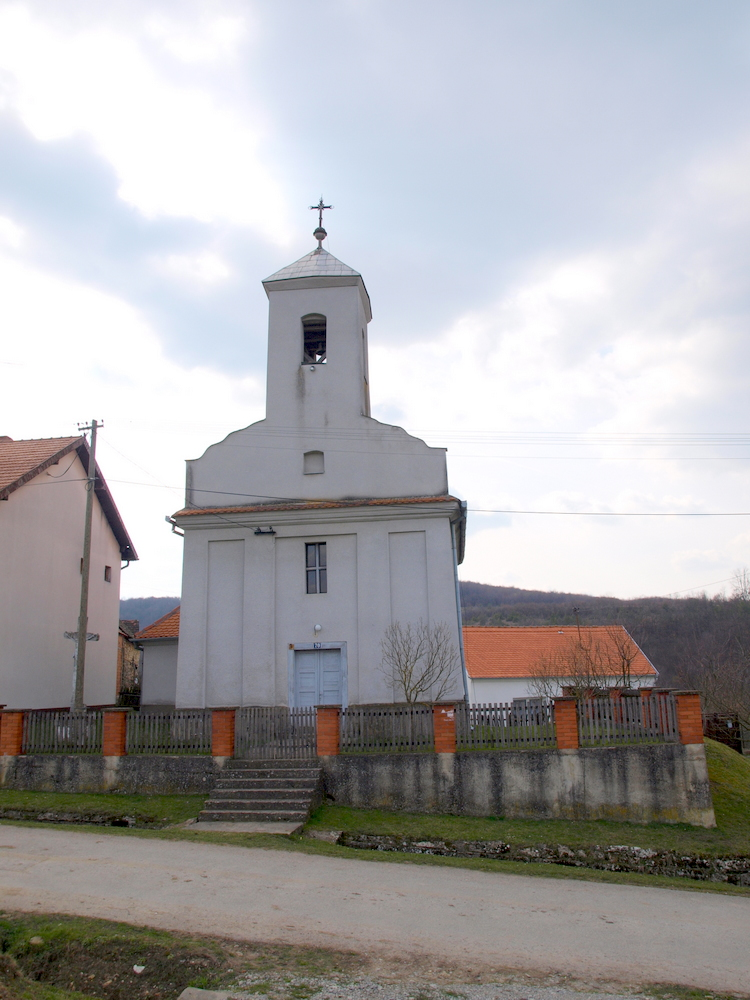 Crkva u selu Zdenci, Brodsko-posavska županija.